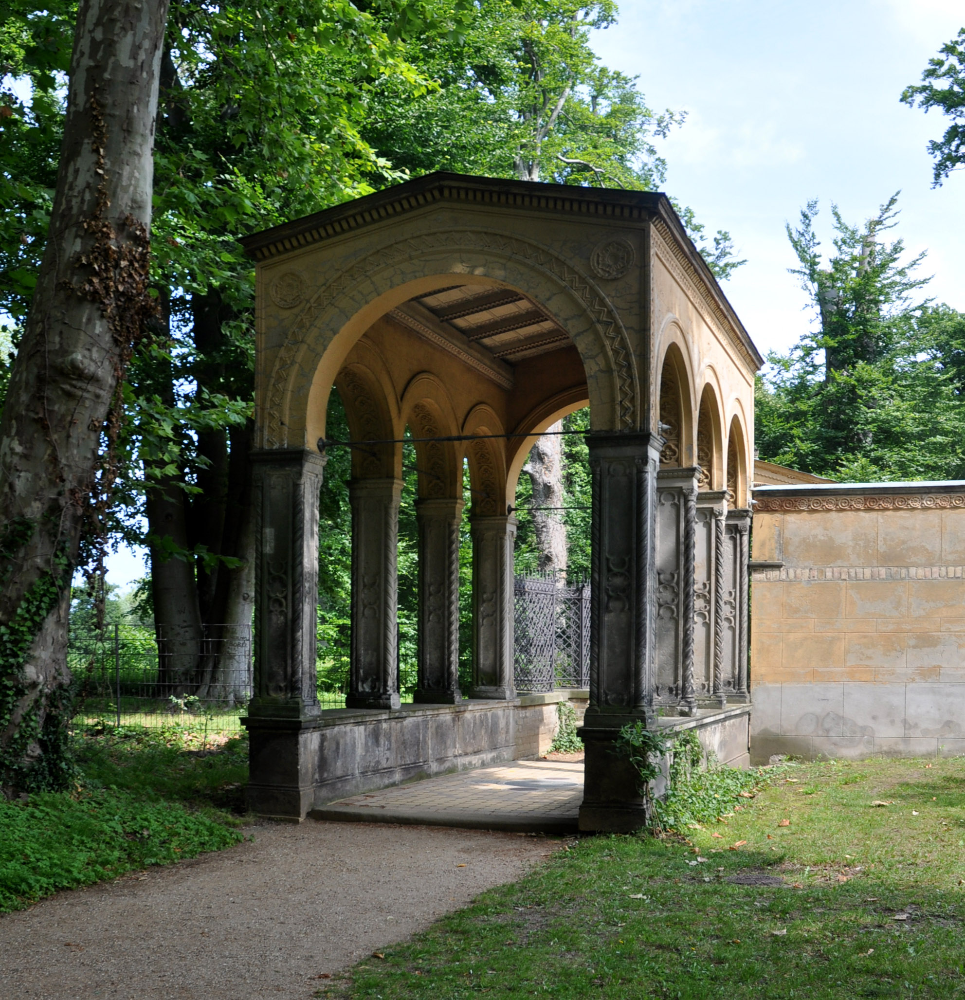 Die Südhalle des Klosterhofes vom Pleasureground